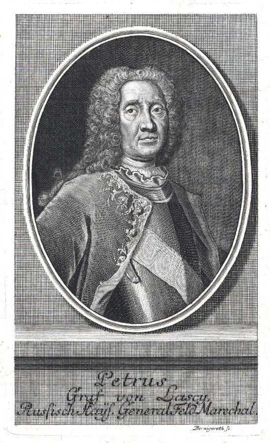 Peter von Lacy